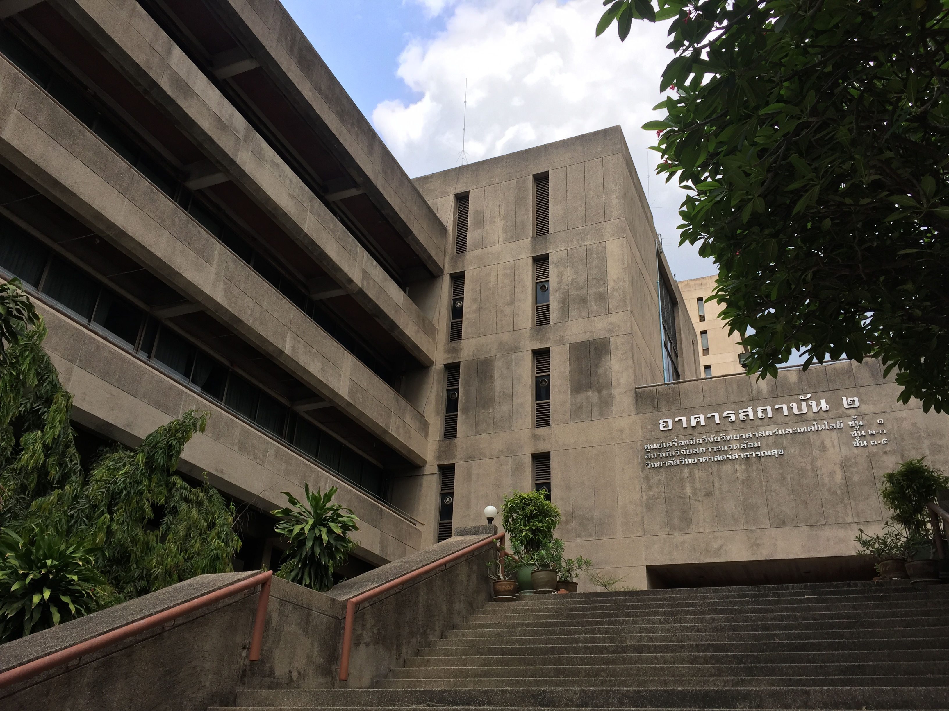 ทางขึ้นอาคารสถาบัน 2-3 ที่ตั้งของวิทยาลัยวิทยาศาสตร์สาธารณสุข จุฬาลงกรณ์มหาวิทยาลัย